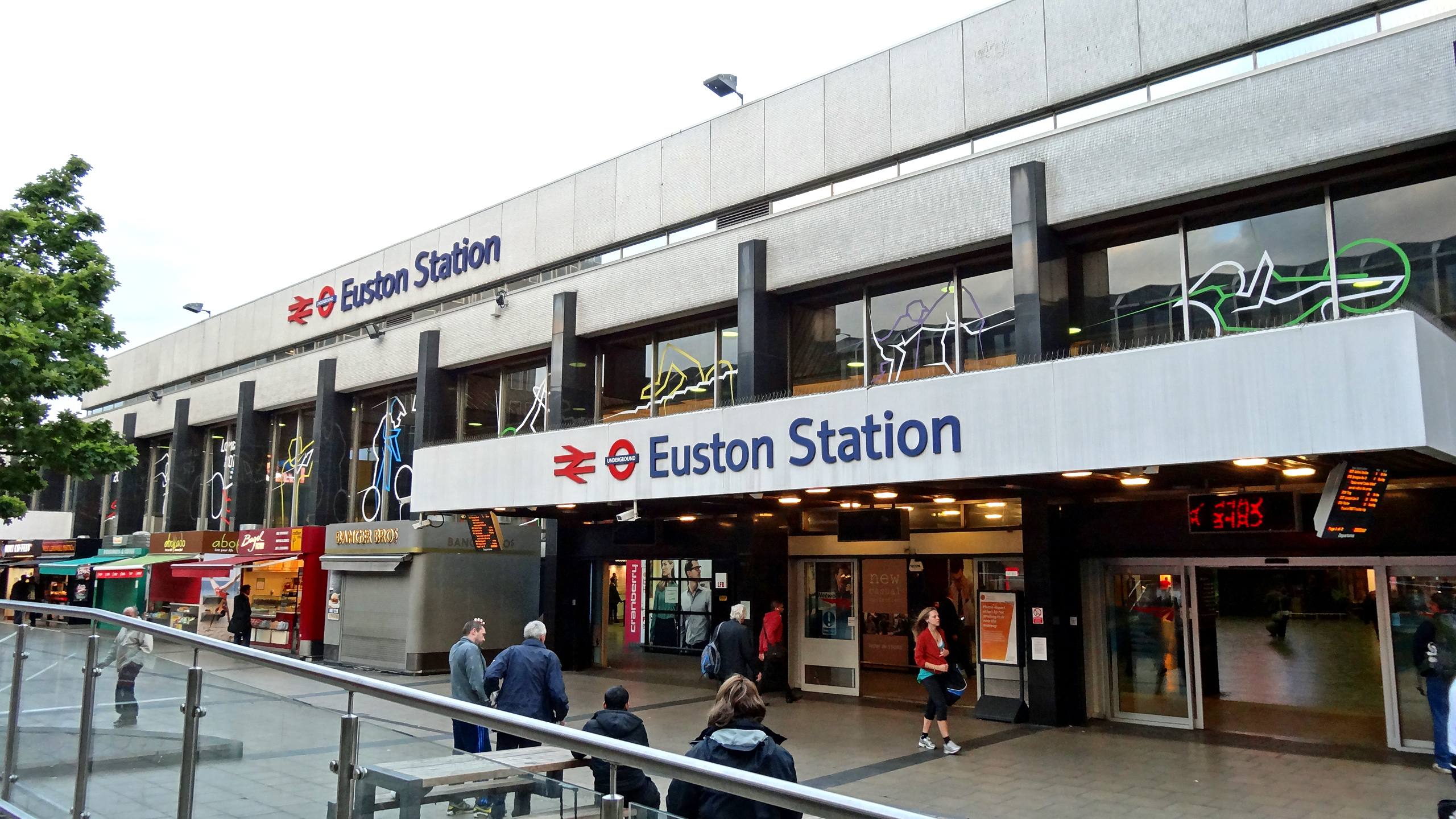 ロンドン Euston駅